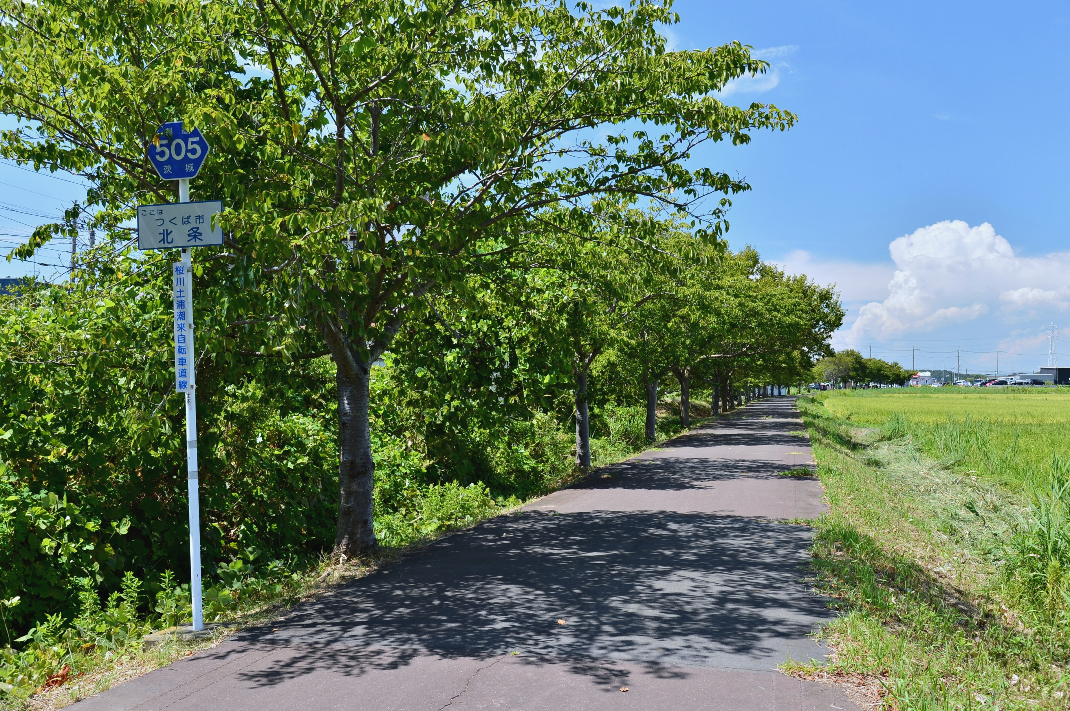 茨城県道505号桜川土浦潮来線（つくば市北条）。茨城県道138号石岡つくば線交点より、桜川方面に向けて撮影。